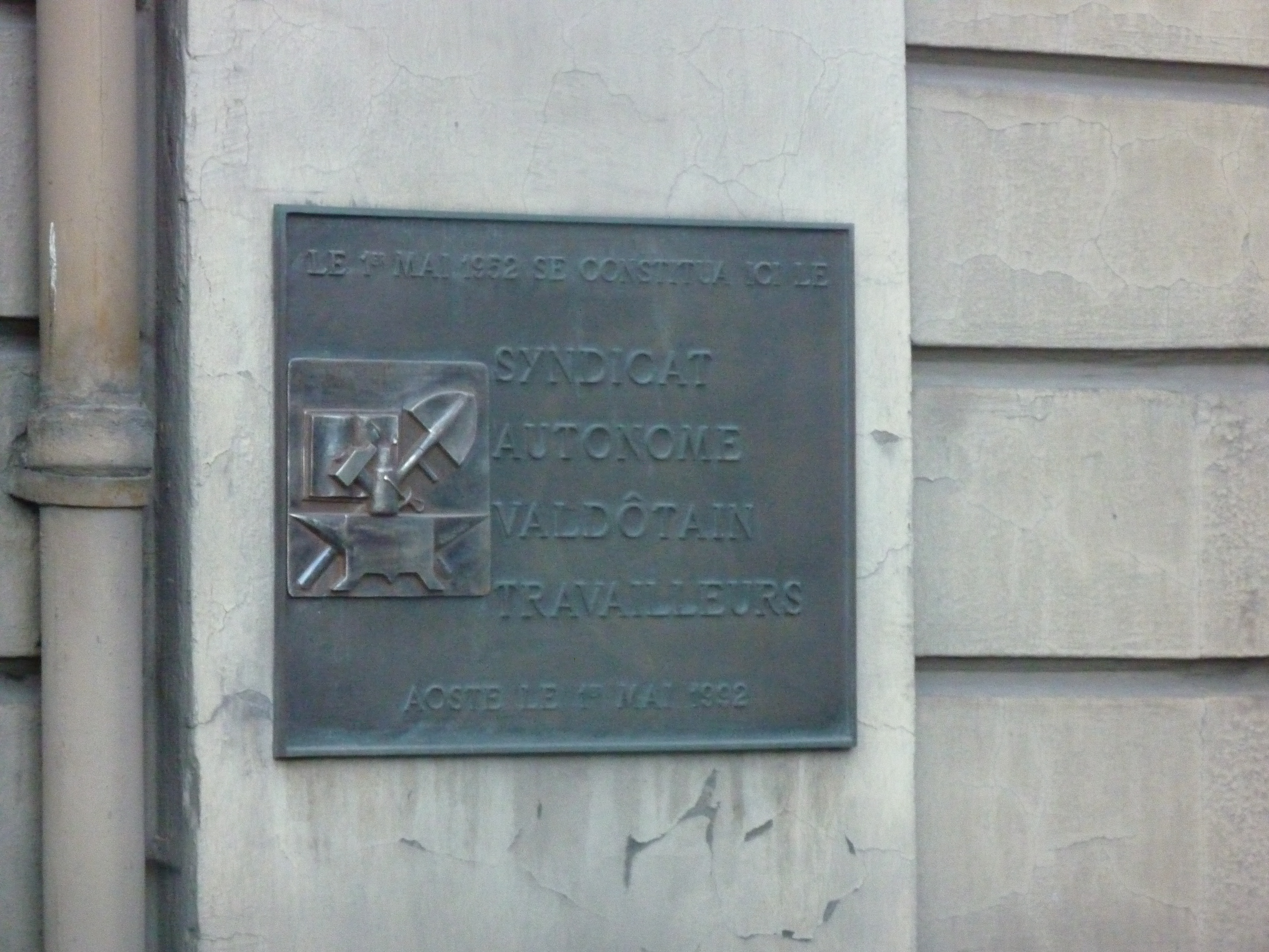 Plaque commémorative près de l'entrée du SAVT à Aoste (place Innocent Manzetti)